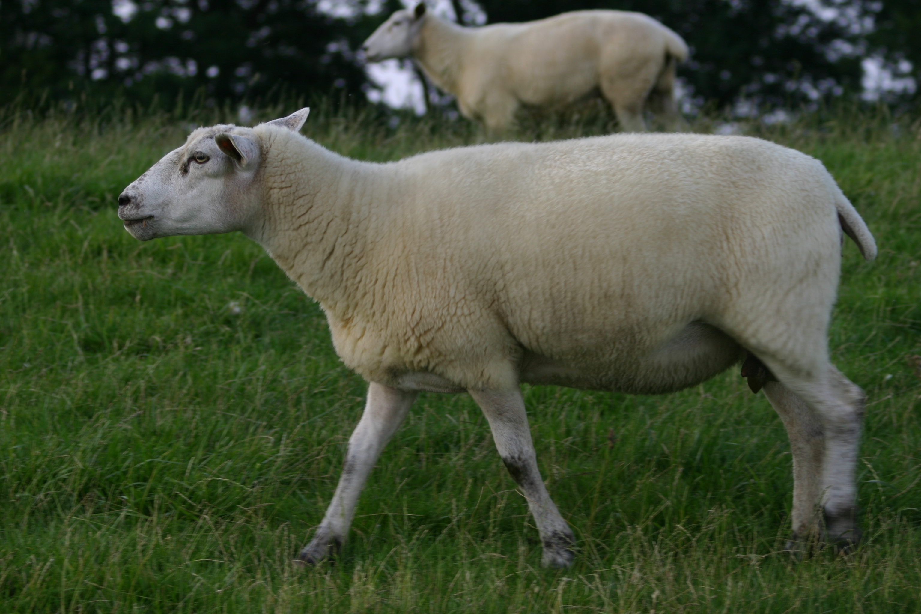 Hausschaf, von der Seite, aufgenommen auf dem Emsdeich bei Emden